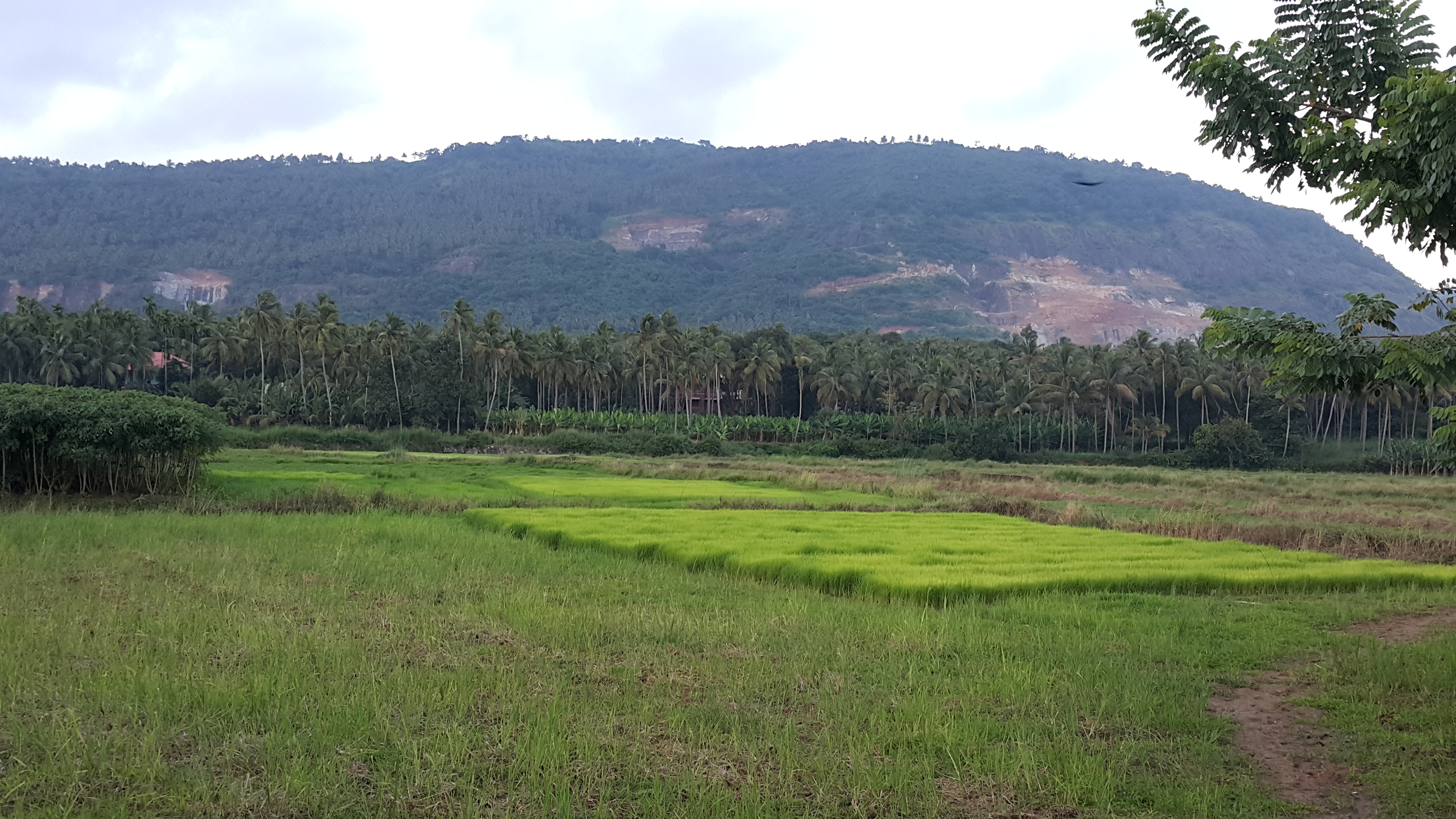 ഊരകം മല. ചേറൂർ കിളിനക്കോട് നിന്നുള്ള കാഴ്ച...